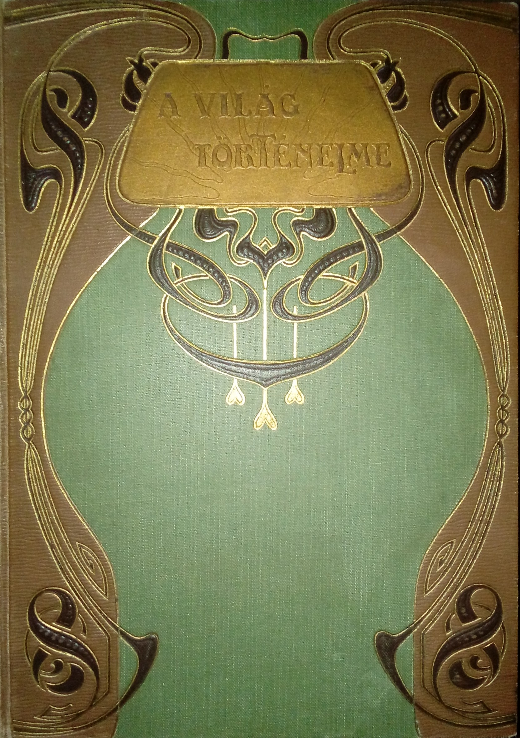 Endrei Zalán: A világ történelme (1906-1908)